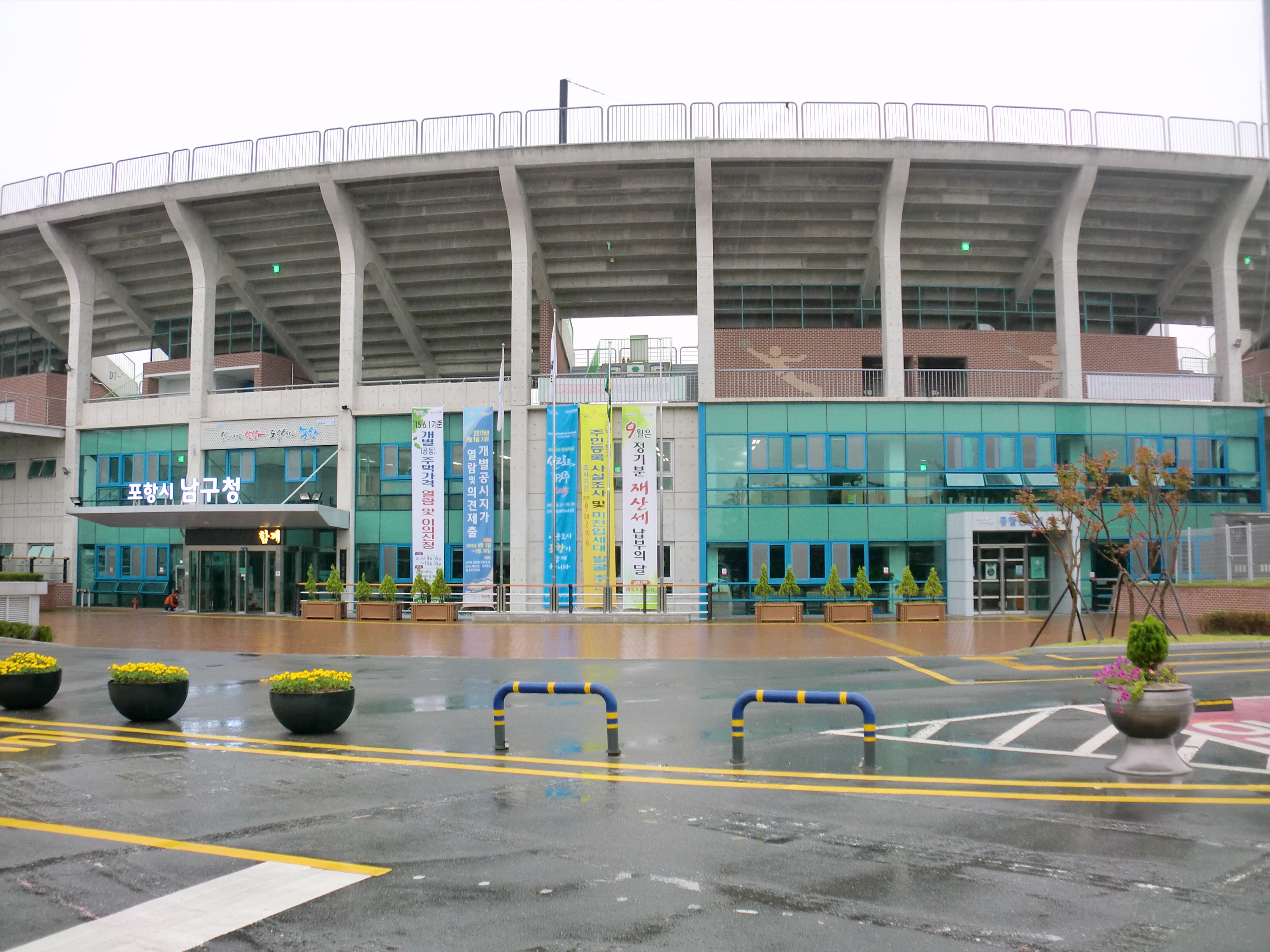 경상북도 포항시에 있는 남구청